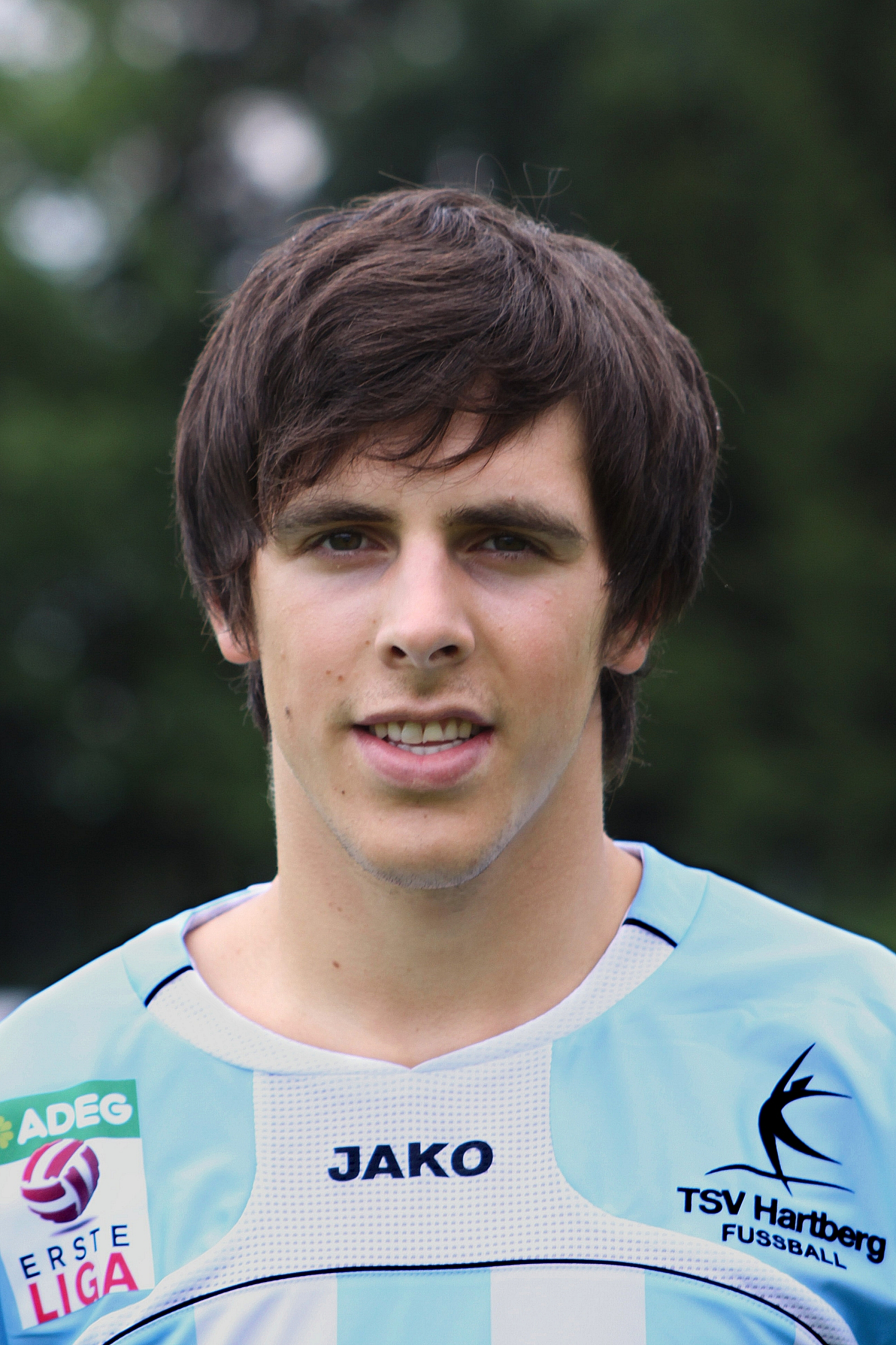 Daniel Siegl - TSV Hartberg (1)